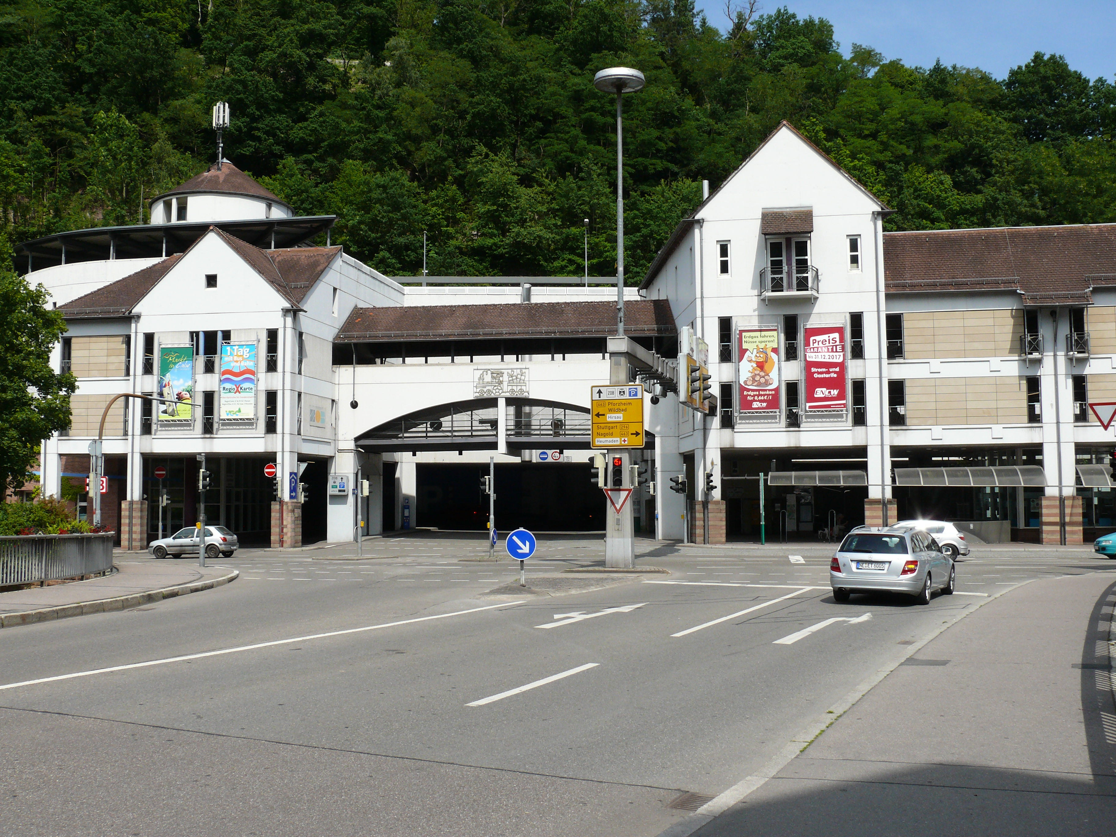 Der Bahnhof von Calw, heute ein einfacher Haltepunkt der sich über dem Parkhaus befindet.